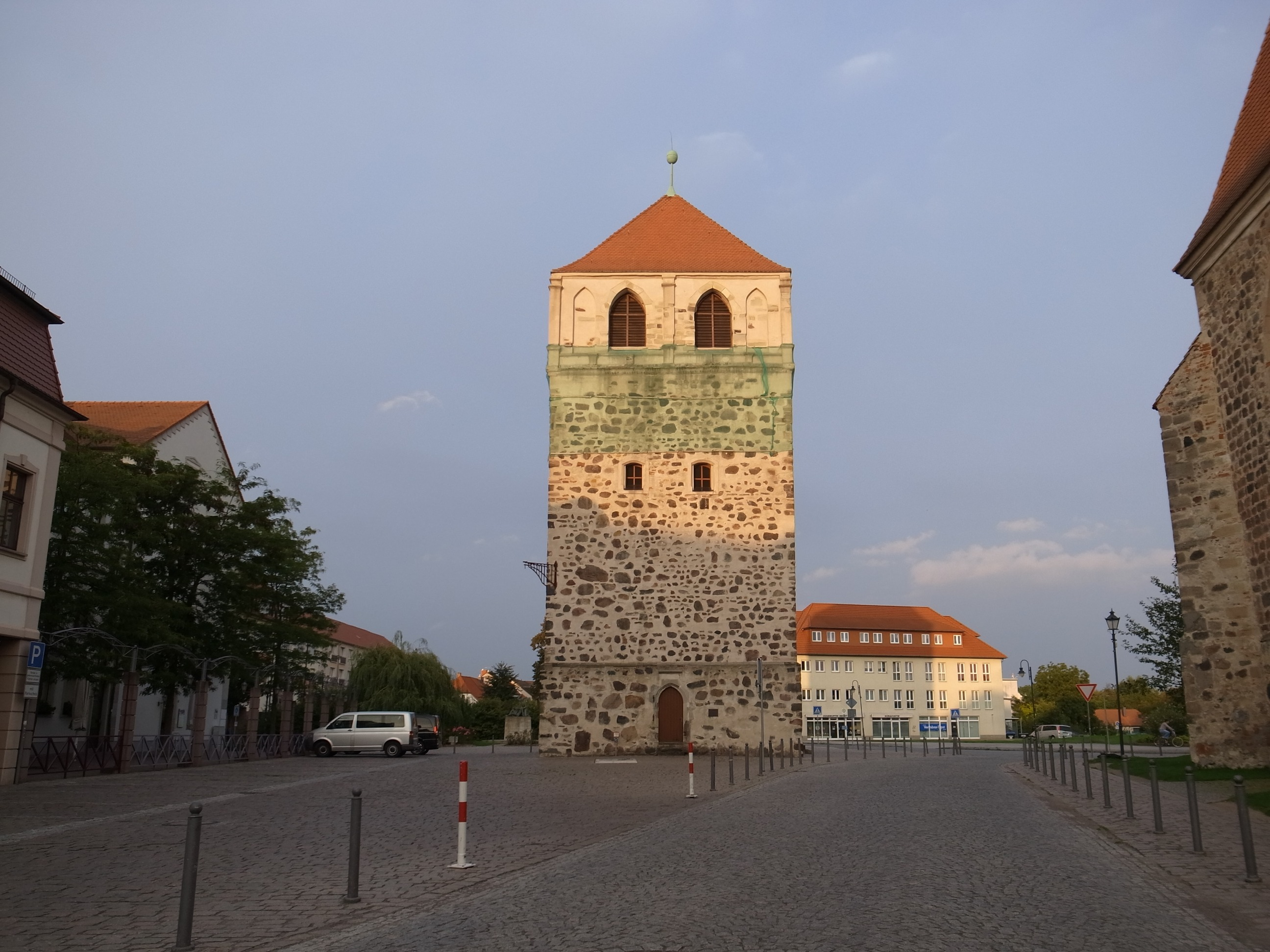 Zerbst, Glockenturm, Dicker Turm